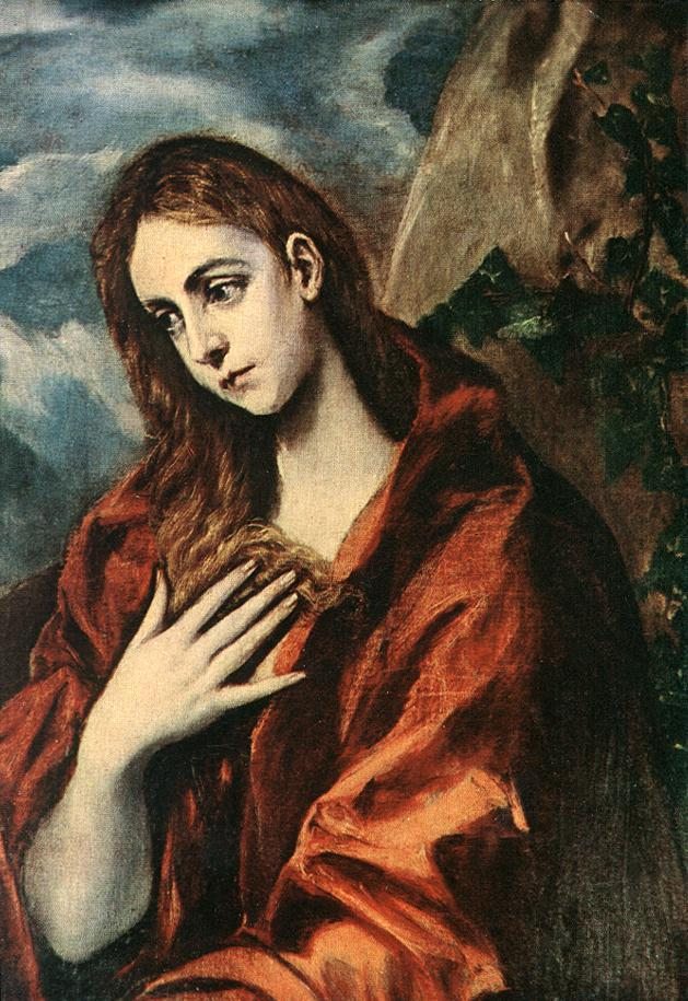 La obra representa a Santa María Magdalena haciendo penitencia por sus pecados.